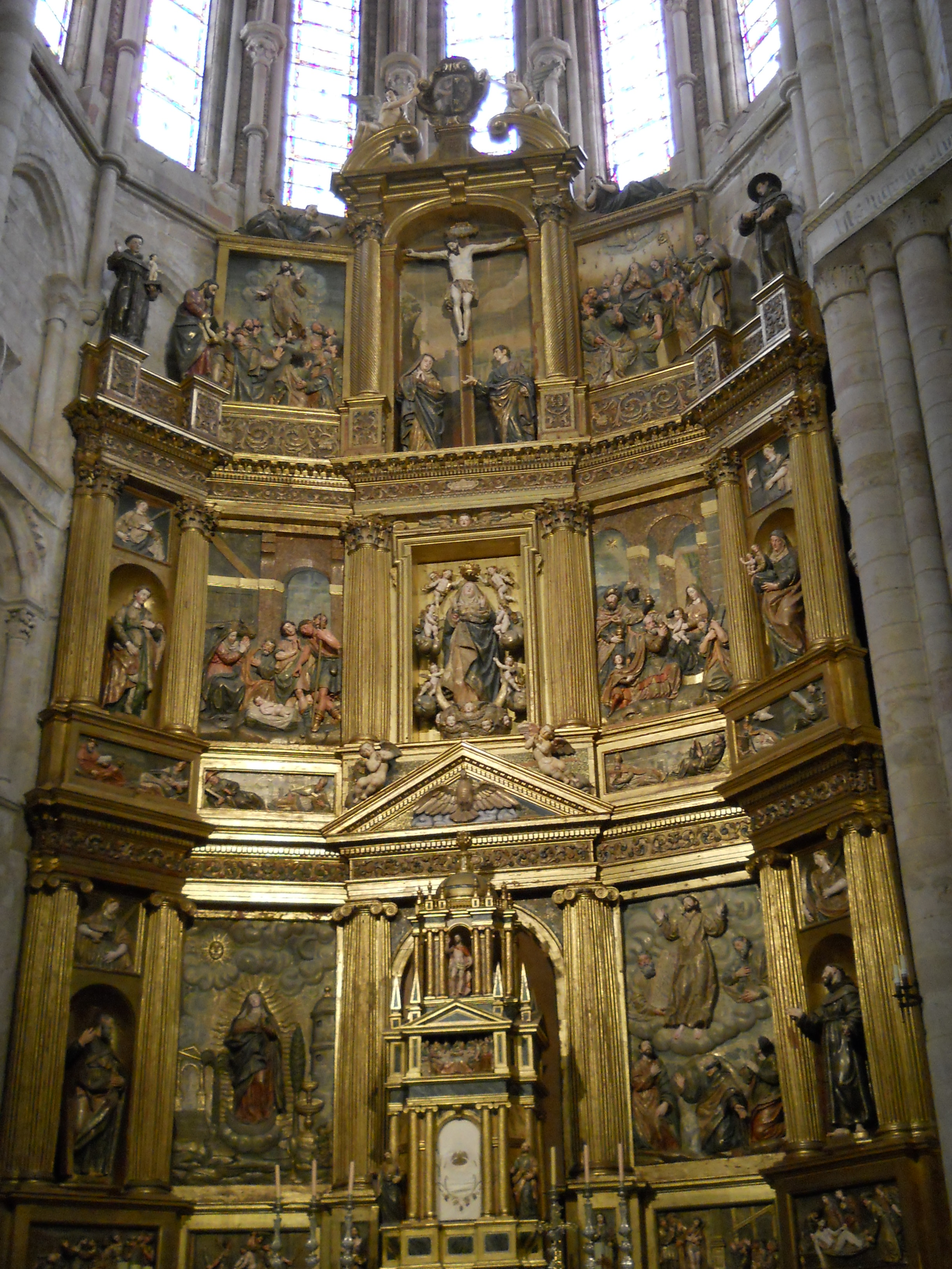 Retablo, Catedral de Santa María de Sigüenza, Guadalajara, España